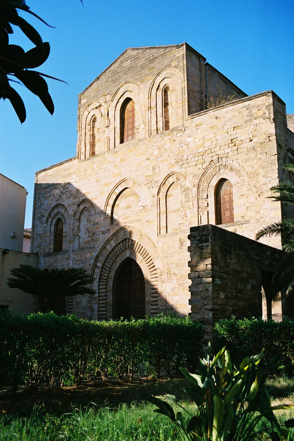 La Magione, Palermo (Chiesa della SS Trinità) Front facade